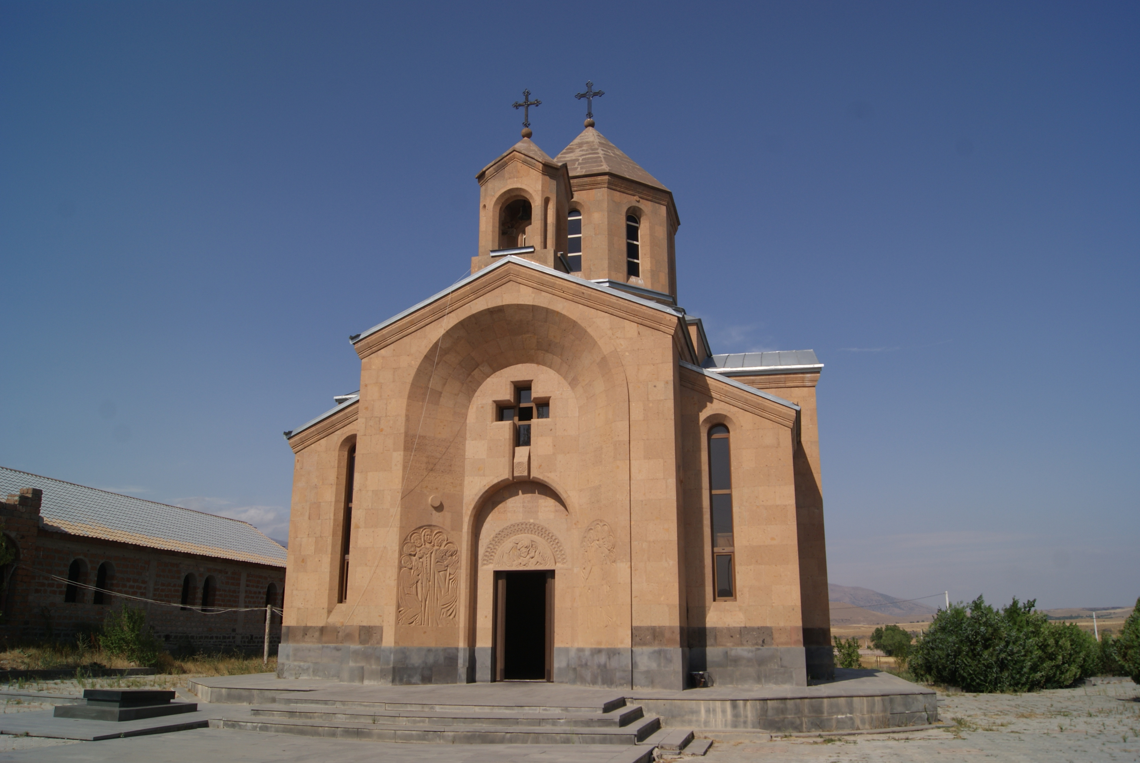 Թեղենիքի սրբոց նահատակաց եկեղեցի 32/2